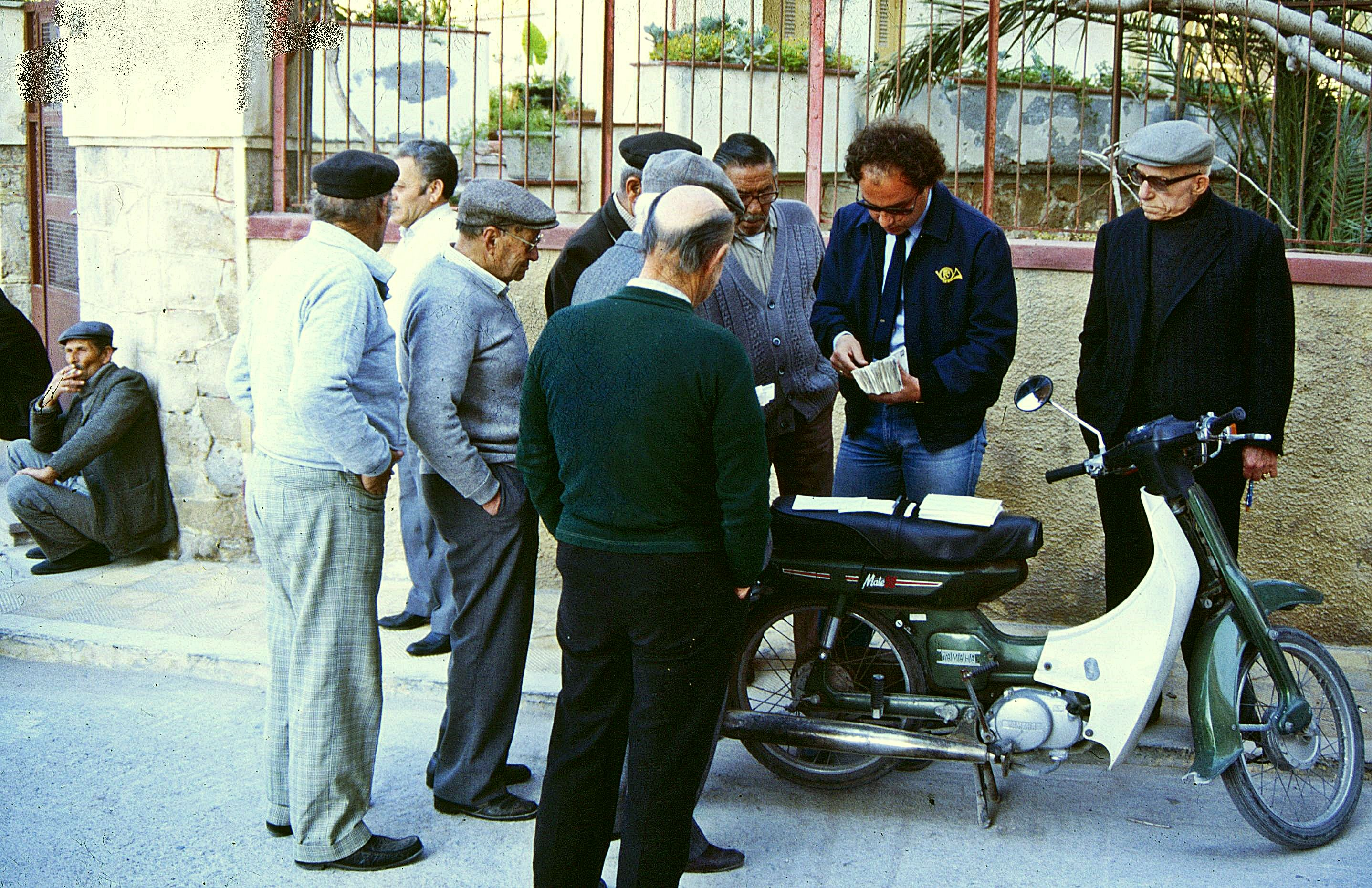 Rentner-Auszahlung in Ägina-Stadt